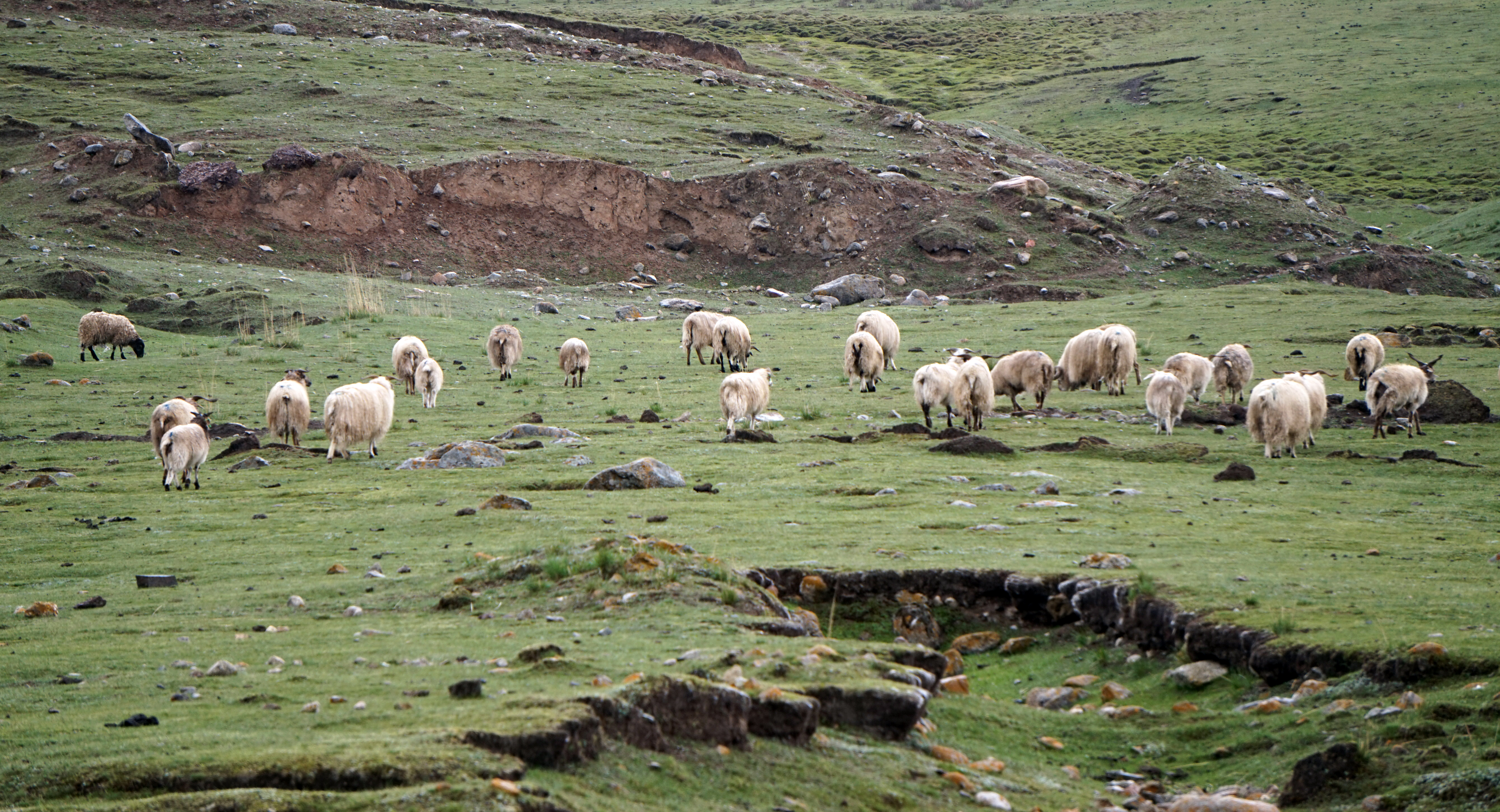 青海（应是湟源县一带）羊群。